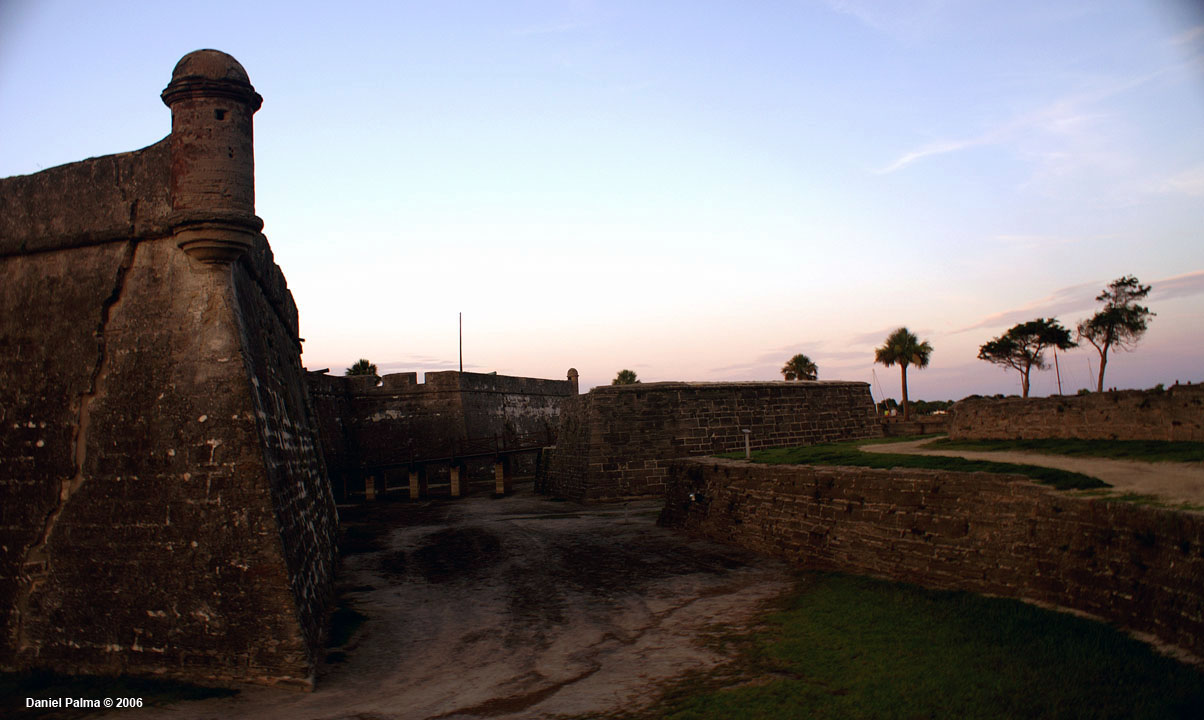 Fort San Marcos, Saint Augustine, FL. Castillo de San Marcos, San Agustín, FL.